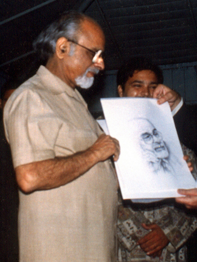 I k gujral